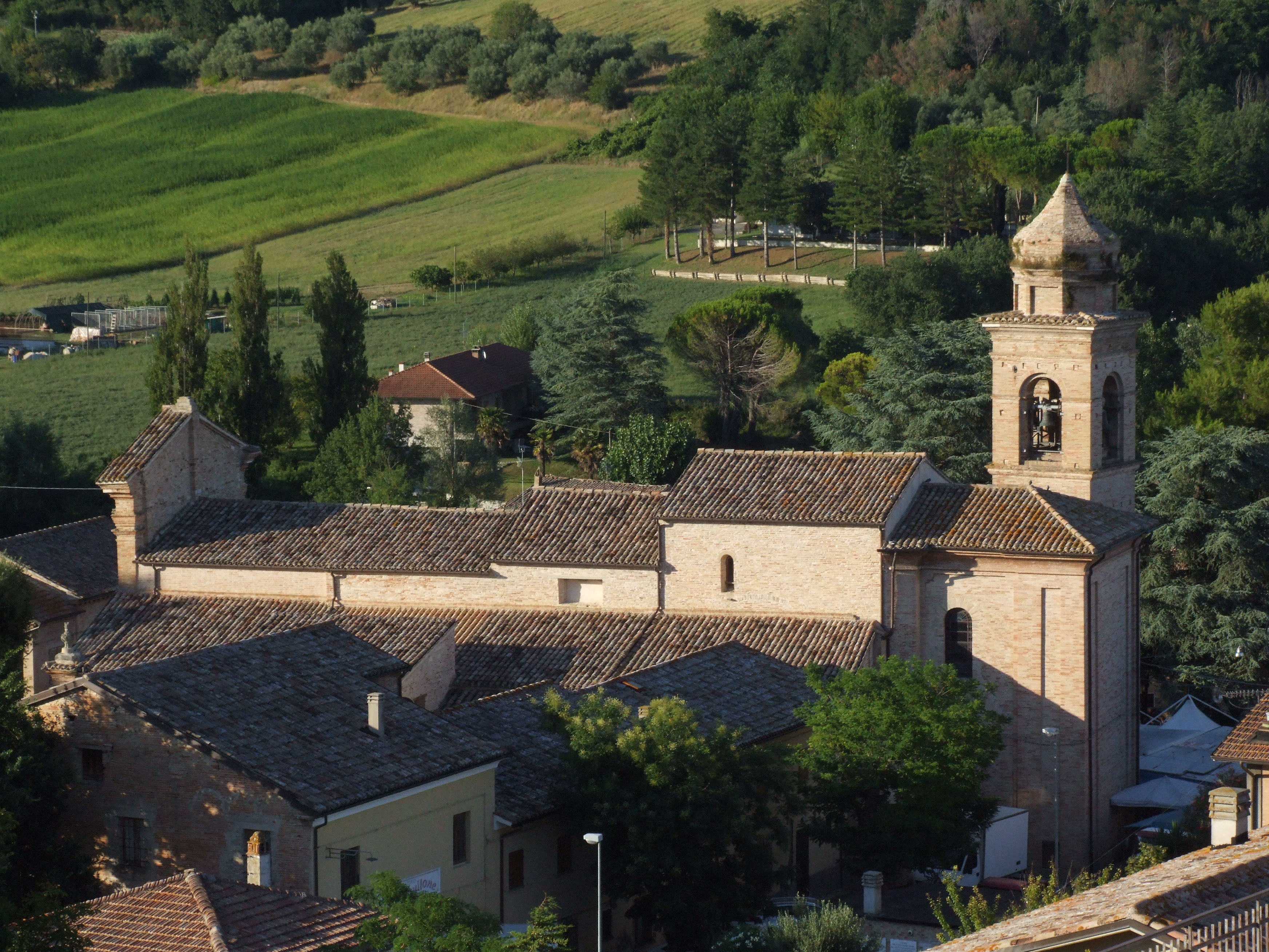 Abbazia benedettina This is a photo of a monument which is part of cultural heritage of Italy.